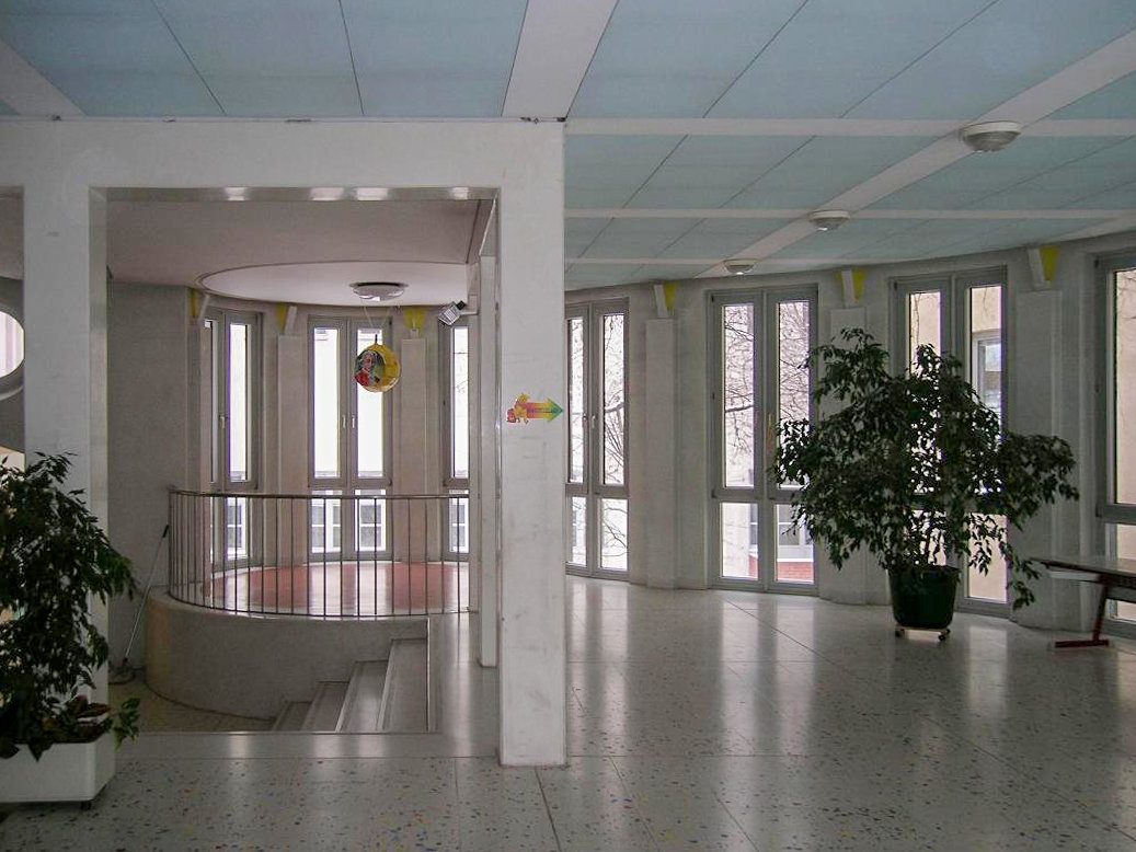 GTVS Köhlergasse, Wien/18, innen, Aula Sonstiges: frei verwendbar